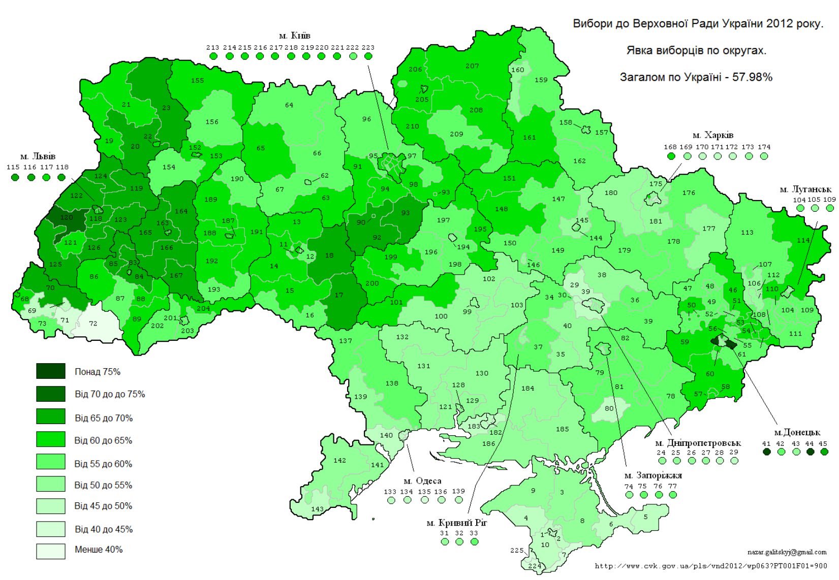 Україна. Парламентські вибори 2012. Явка виборців у розрізі округів.